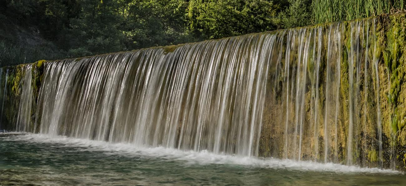 Presa situada entre el Congost d'Ovarra i Pardinella